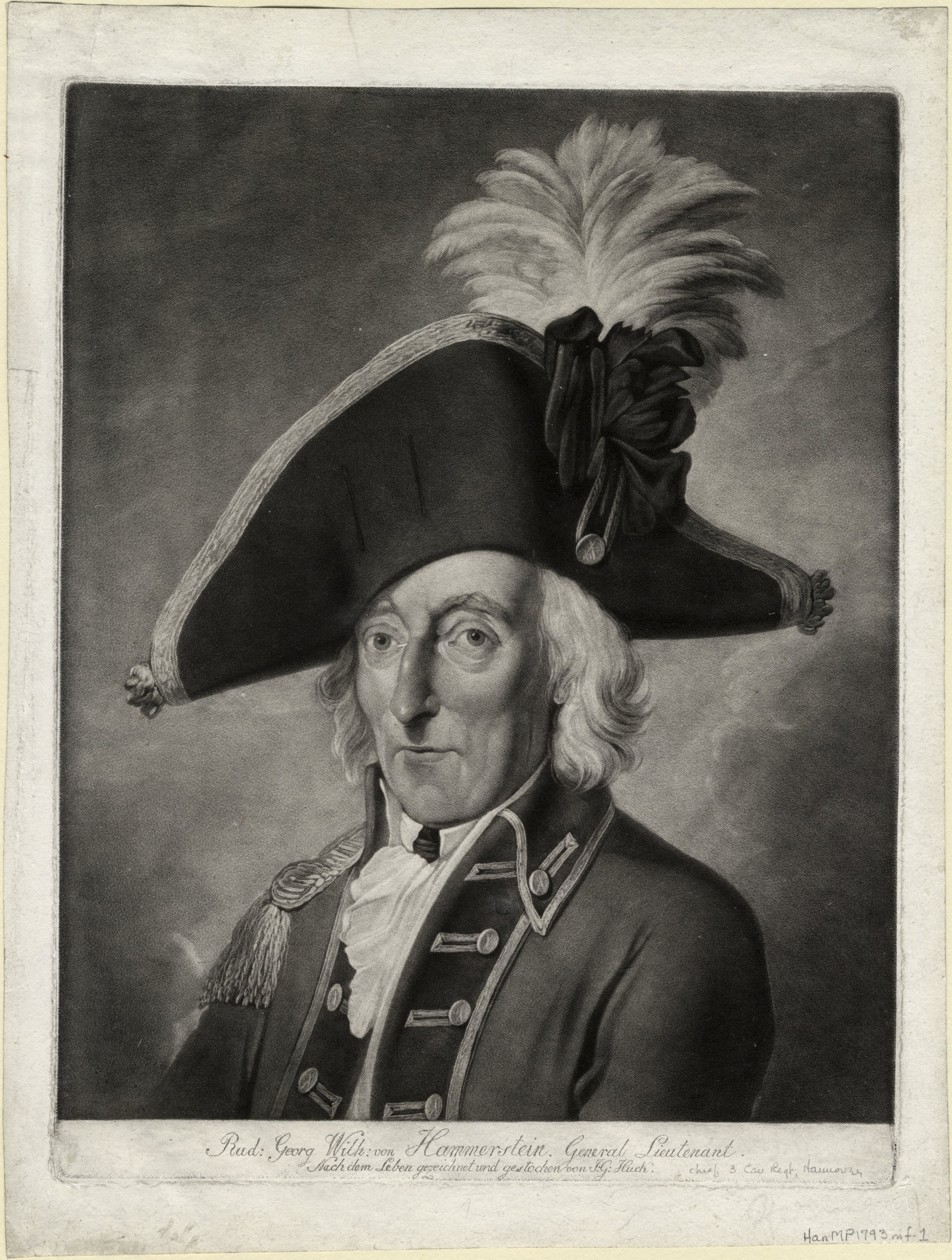 Engraving by Johann Gerhard Huck (* 1759 in Düsseldorf; † 16. August 1811 in Hannover)